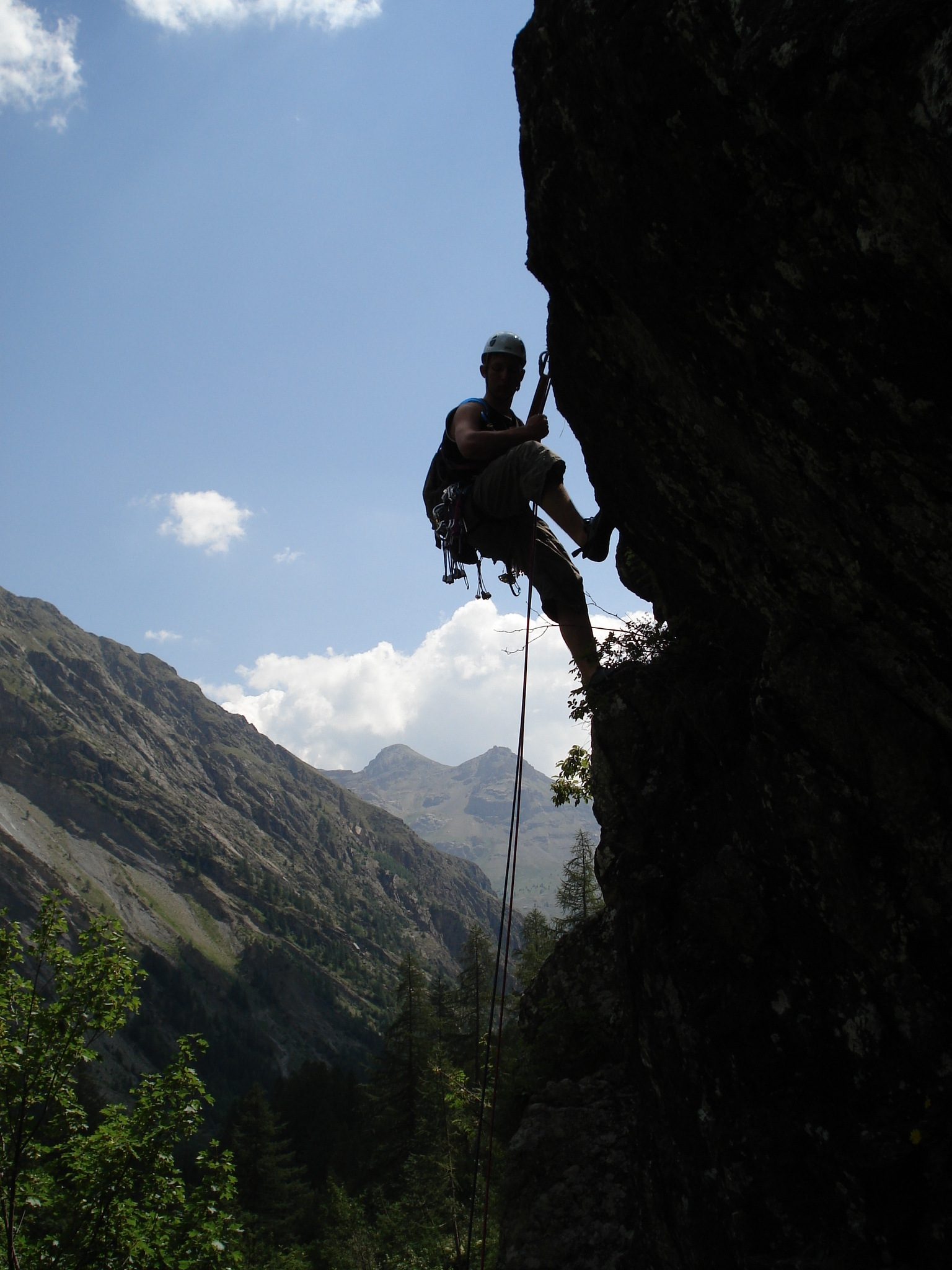 Rappelende klimmer (Lucas Boden) in Aillefroide (Frankrijk)